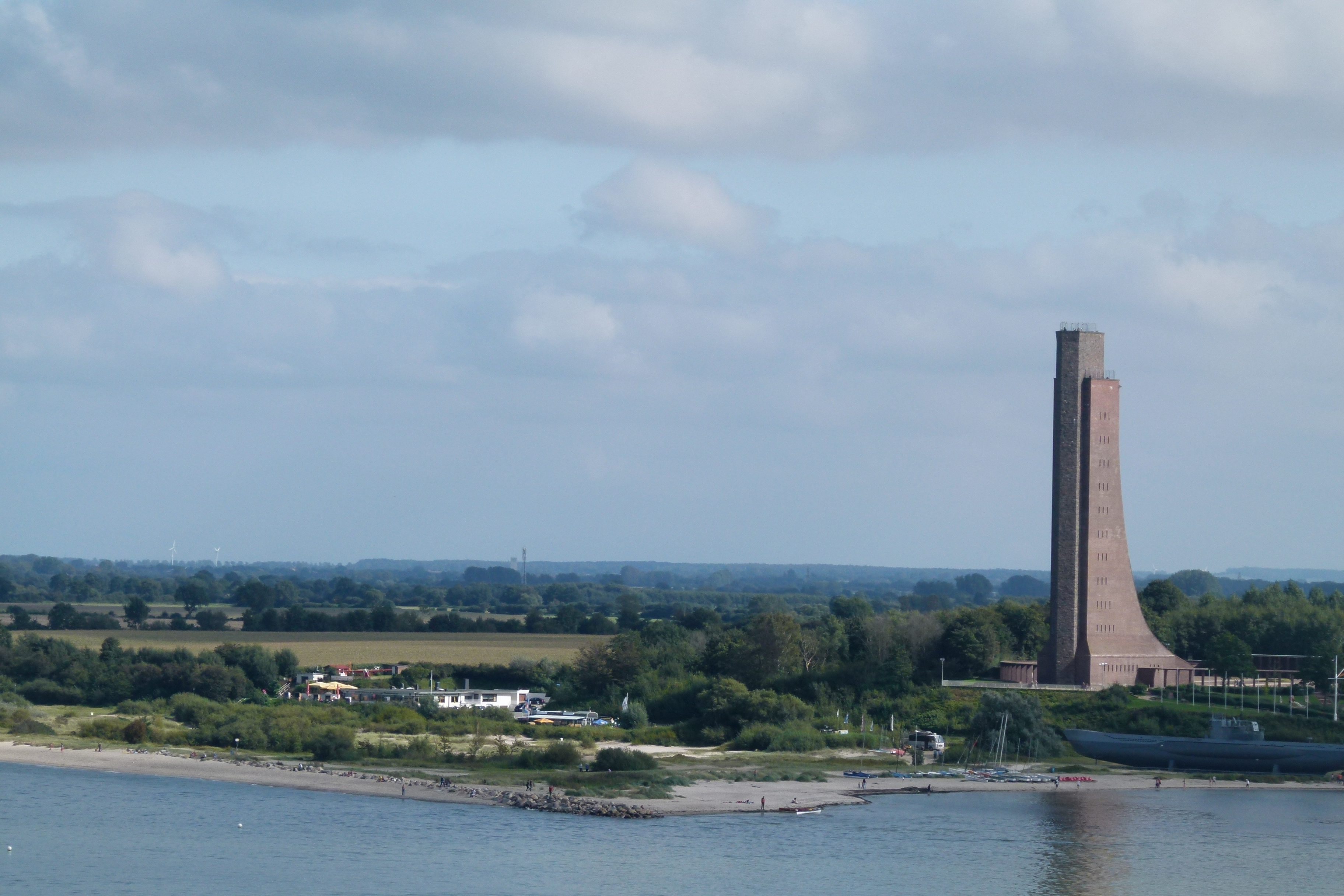 Aufgenommen vom Oberdeck einer Fähre nach Norwegen. Standort des Denkmals: Strandstraße 92 24235 Laboe Weitere Informationen